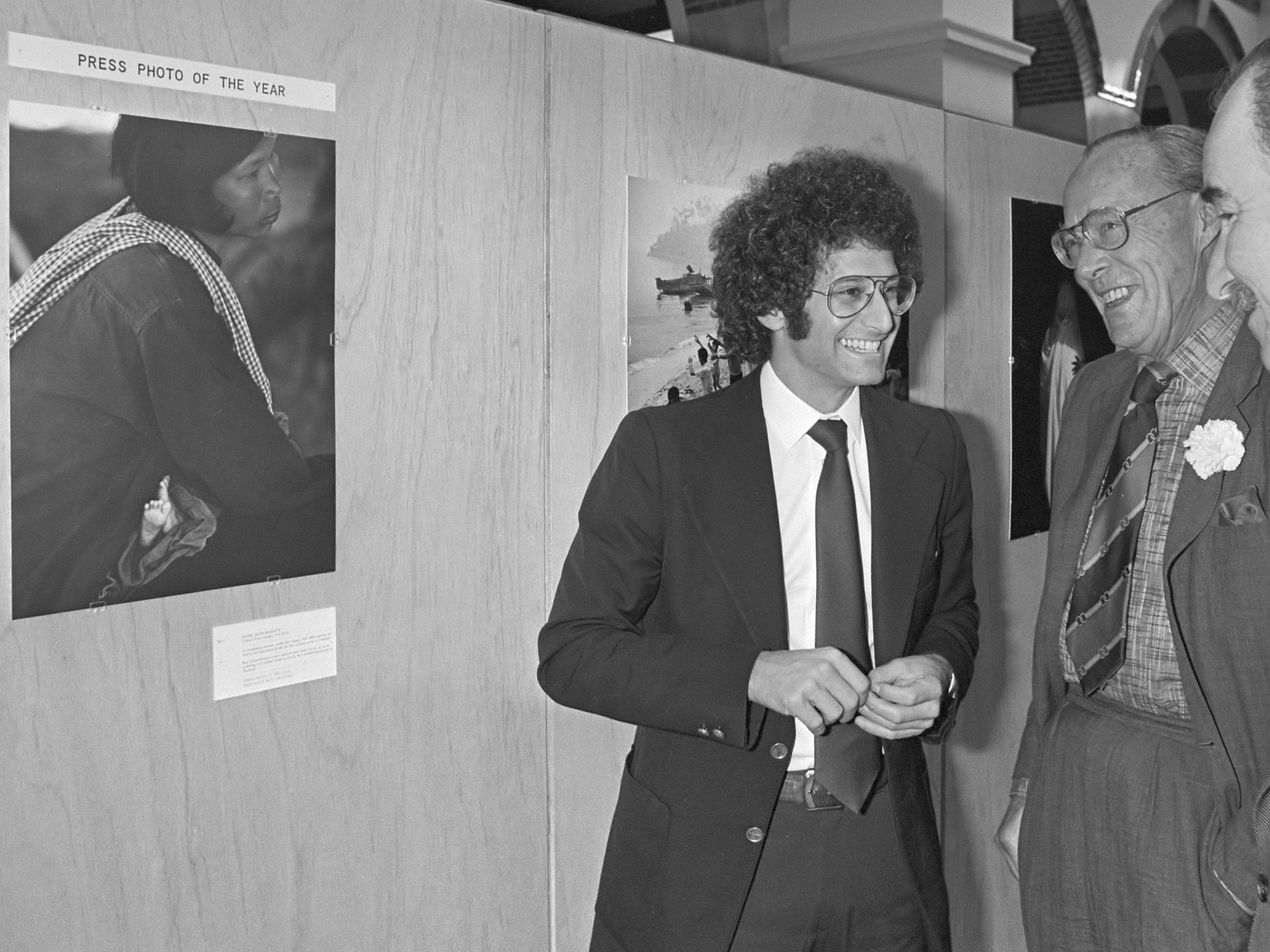 Uitreiking prijzen World Press Photo in Tropenmuseum; v.l.n.r. winnaar David Burnett , Prins Bernhard en minister v.d. Klaauw bij winnende foto 2 april 1980